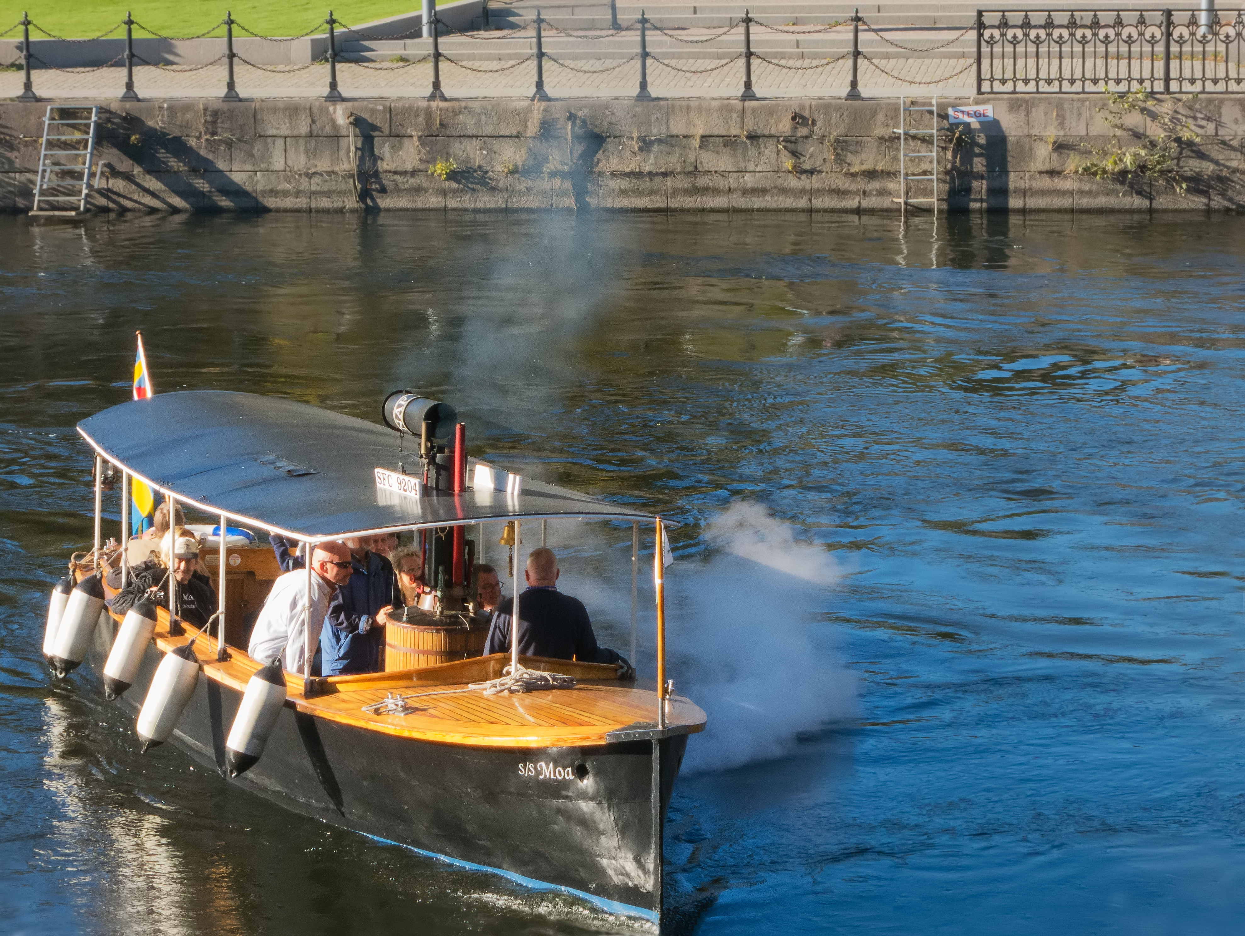 S/S Moa byggdes kring år 1900 och restaurerades 2002-2007 av Norrköpings Ångbåtsförening. Längd 10,7 meter, bredd 2,4 meter, vedeldad ångmaskin om 10 indikerade hästkrafter. 12 passagerare. Här på tur i Norrköpings inre hamn på kulturnattas eftermiddag 26 september 2015 kring 15.40.